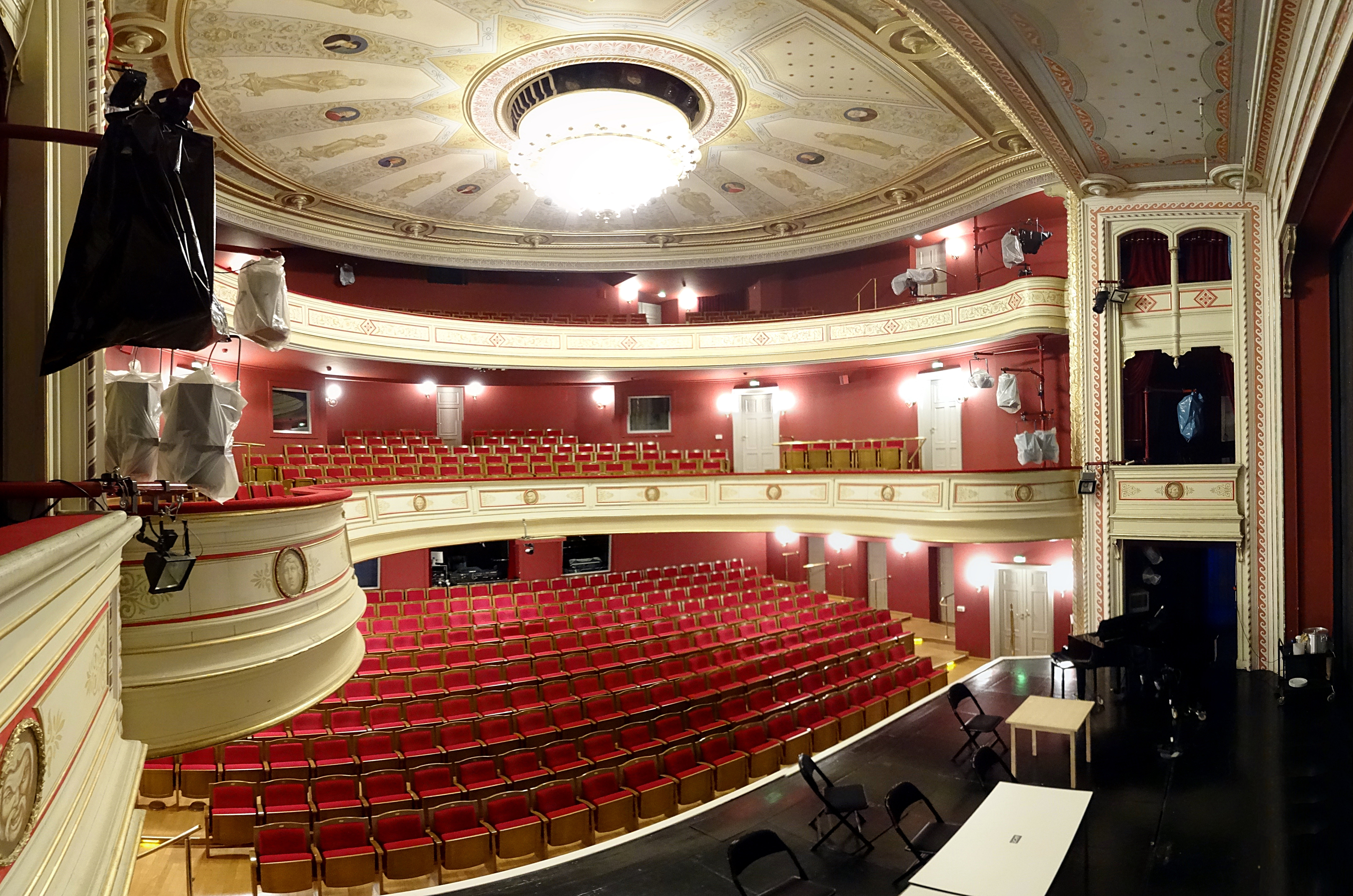 Innenraum-Panorama vom Zuschauerraum im Theater Görlitz